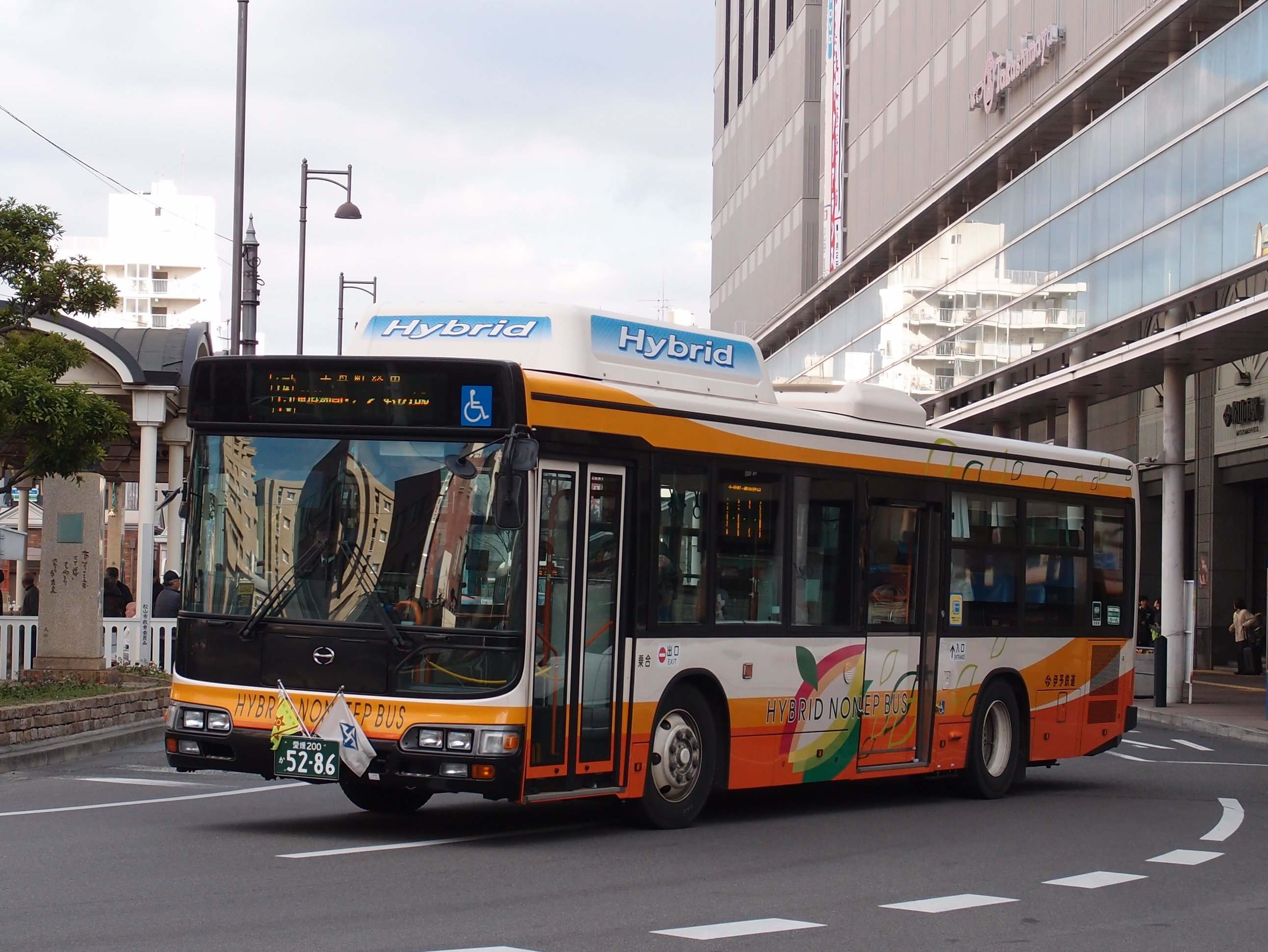 伊予鉄道自動車部 日野ブルーリボン・ハイブリッドノンステップ（LJG-HU8JLGP）